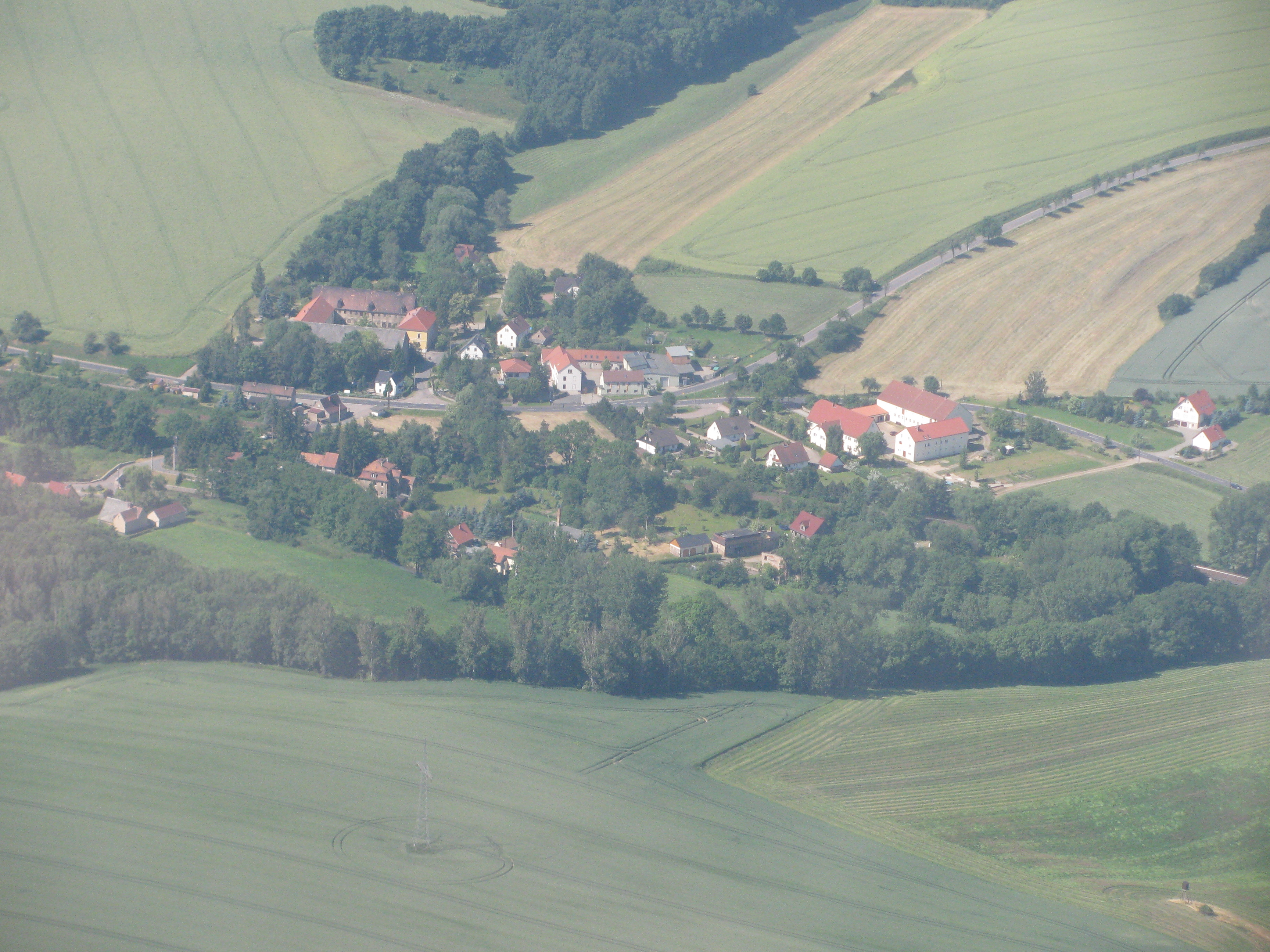 Luftbild Roitzschen, Triebischtal